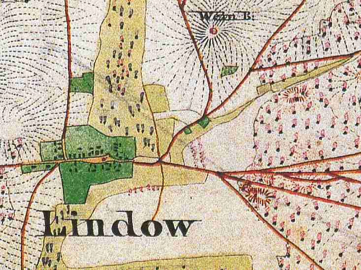 Lindow, Ortsteil der Stadt Friedland, Landkreis Oder-Spree, Brandenburg, Ausschnitt aus dem Urmesstischblatt 3952 Beeskow von 1846